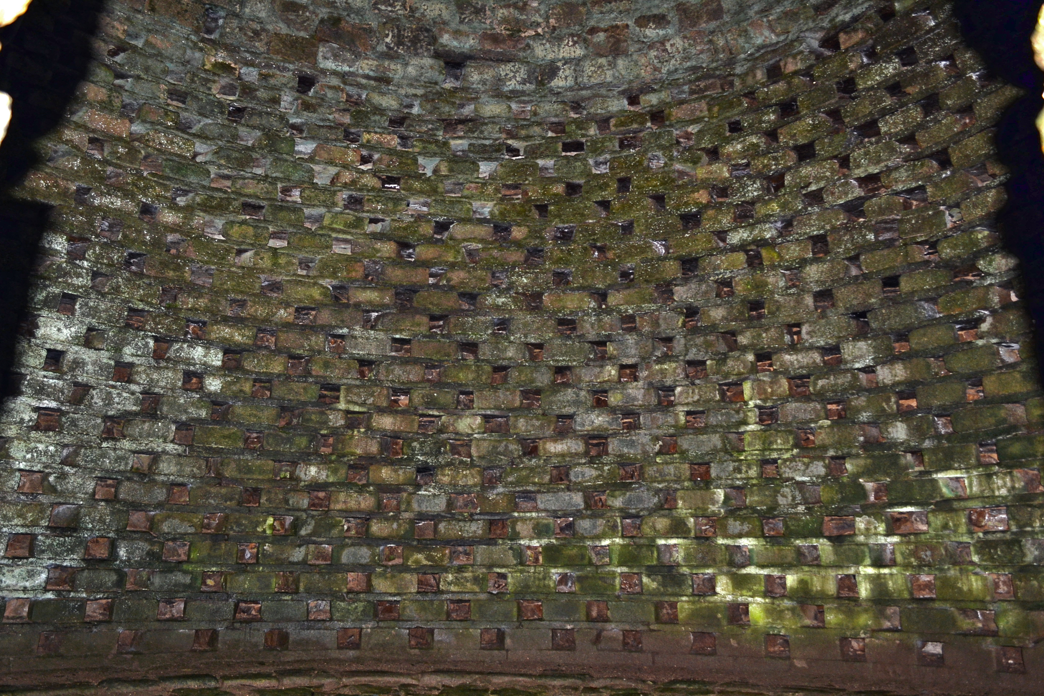 Château de Rosanbo à Lanvellec dans le pays du Trégor (Côtes d'Armor).